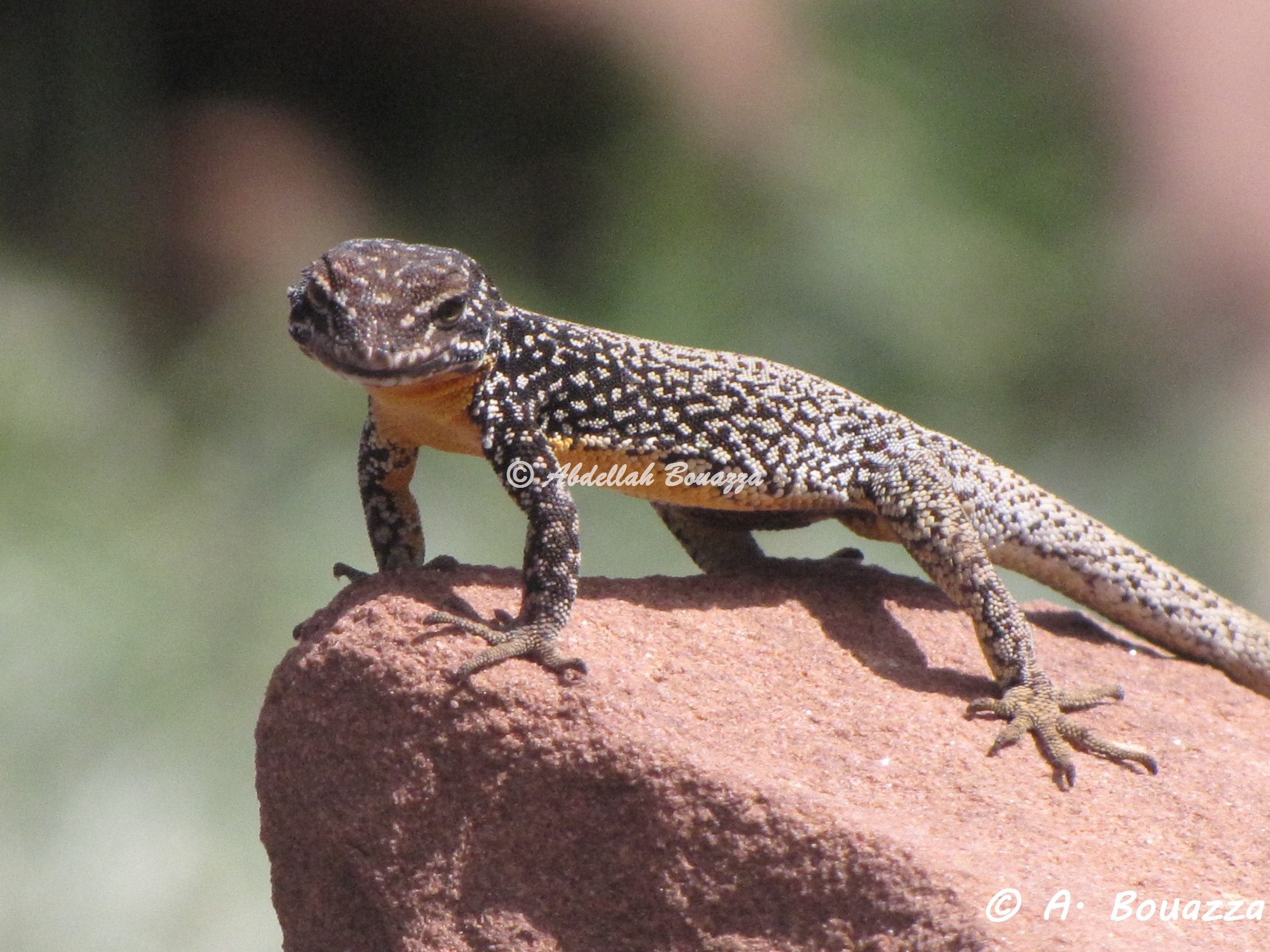 Un male adulte